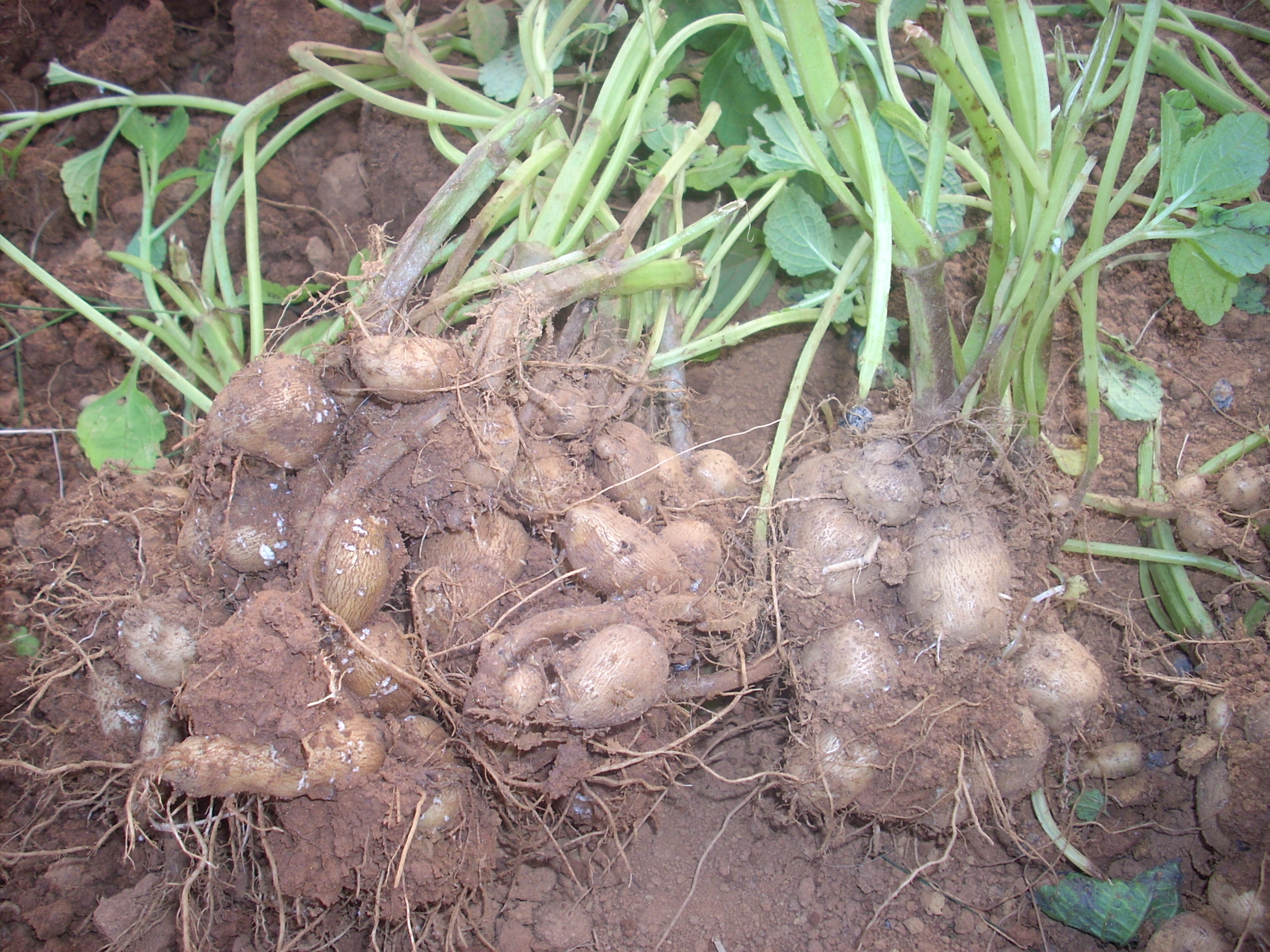 കൂര്‍ക്കകിഴങ്ങ്